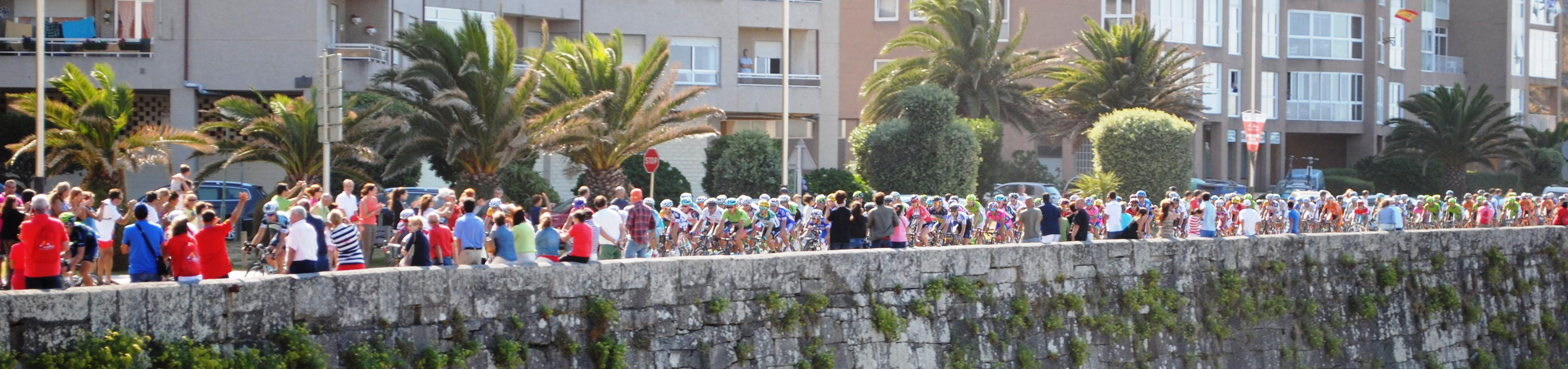 Véxase o título e as categorías